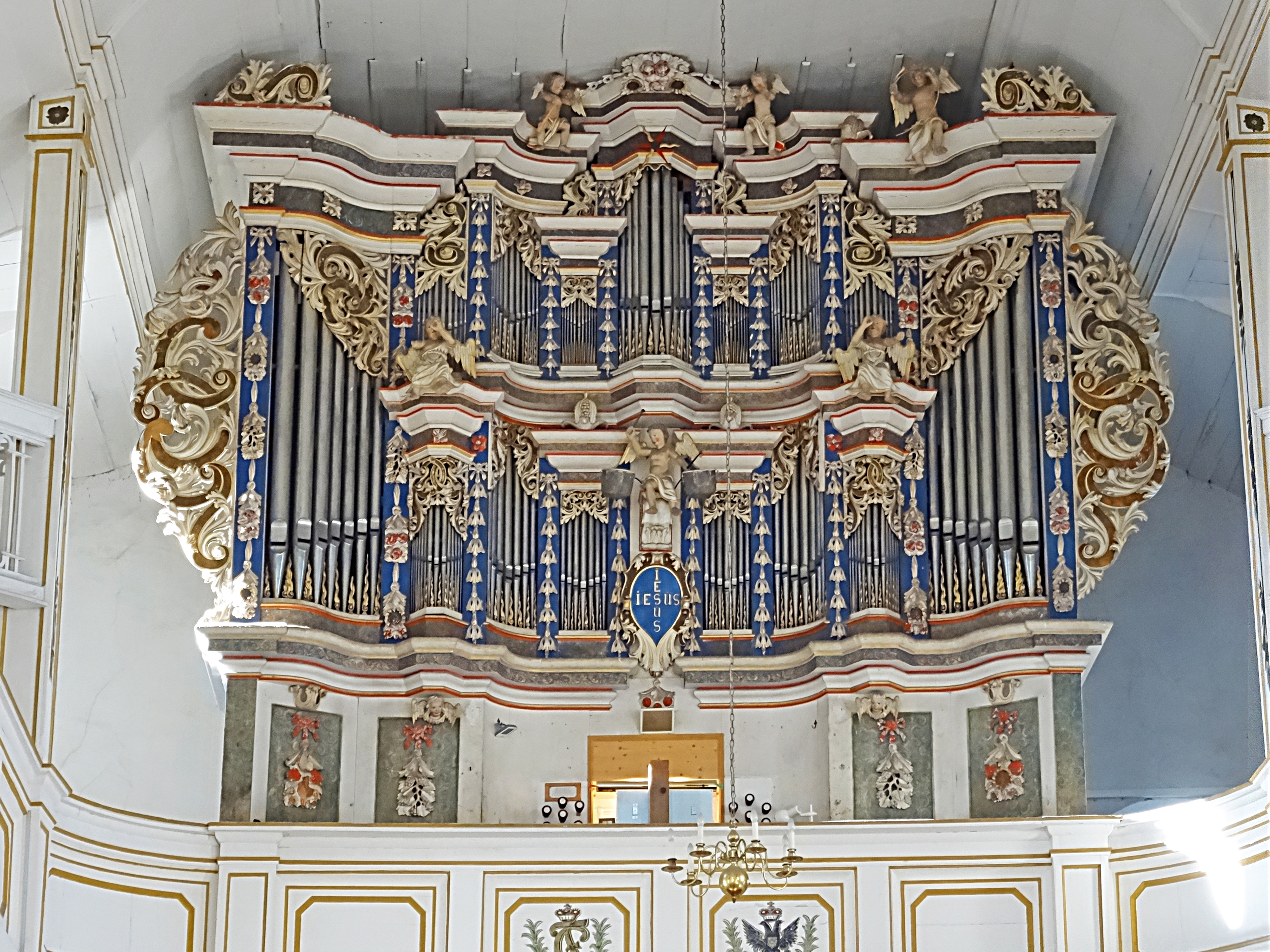 Volckland-Orgel (1747–1751, IIP/27) in der Dorfkirche St. Peter und Paul (Elxleben, Ilm-Kreis)